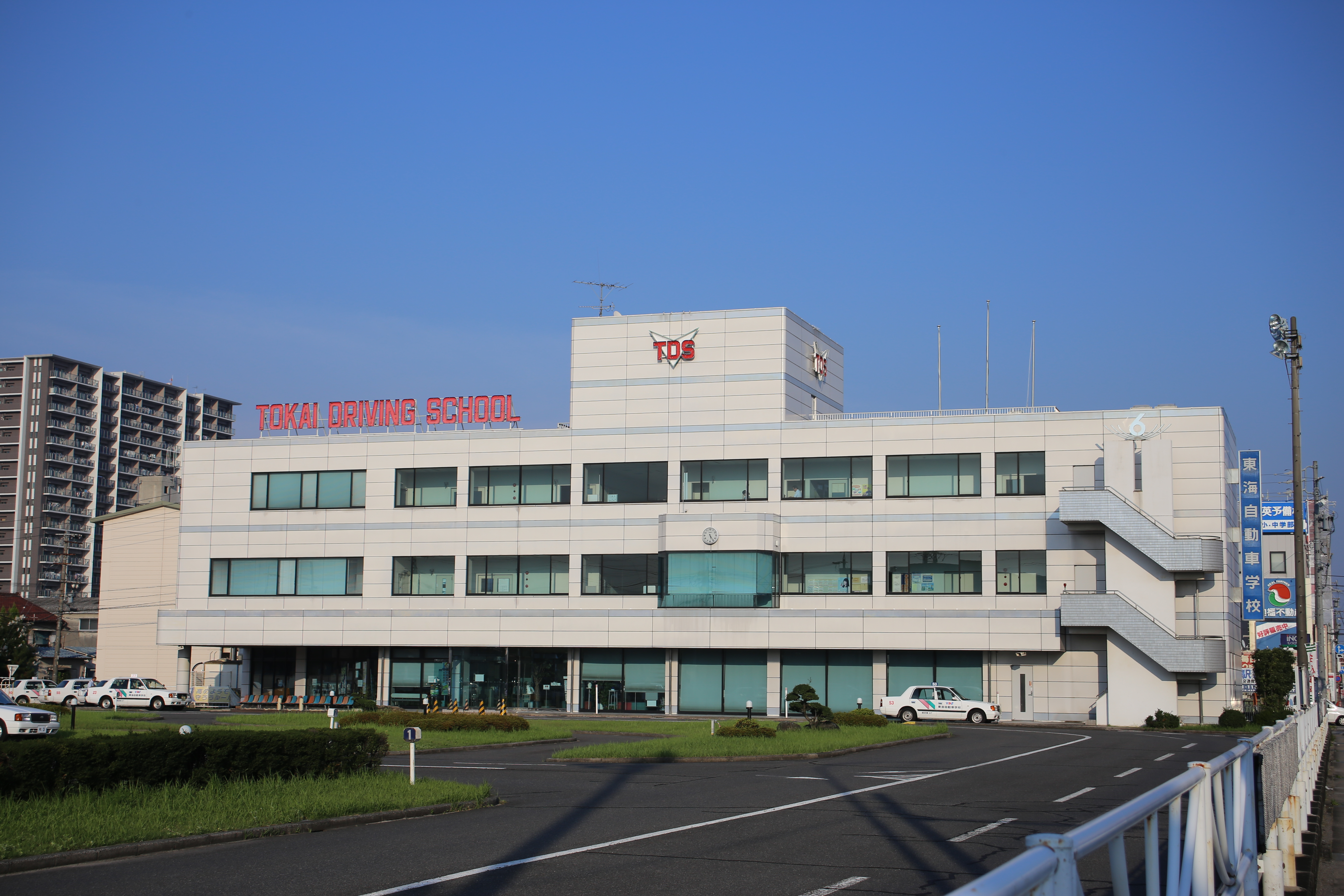 名古屋市緑区鳴海町字上汐田の東海自動車学校を南側公道西側より撮影